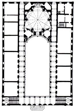 Ο ναός Σαντ' Ίβο Αλλά Σαπιέντζα με την αυλή με τις κιονοστοιχίες.